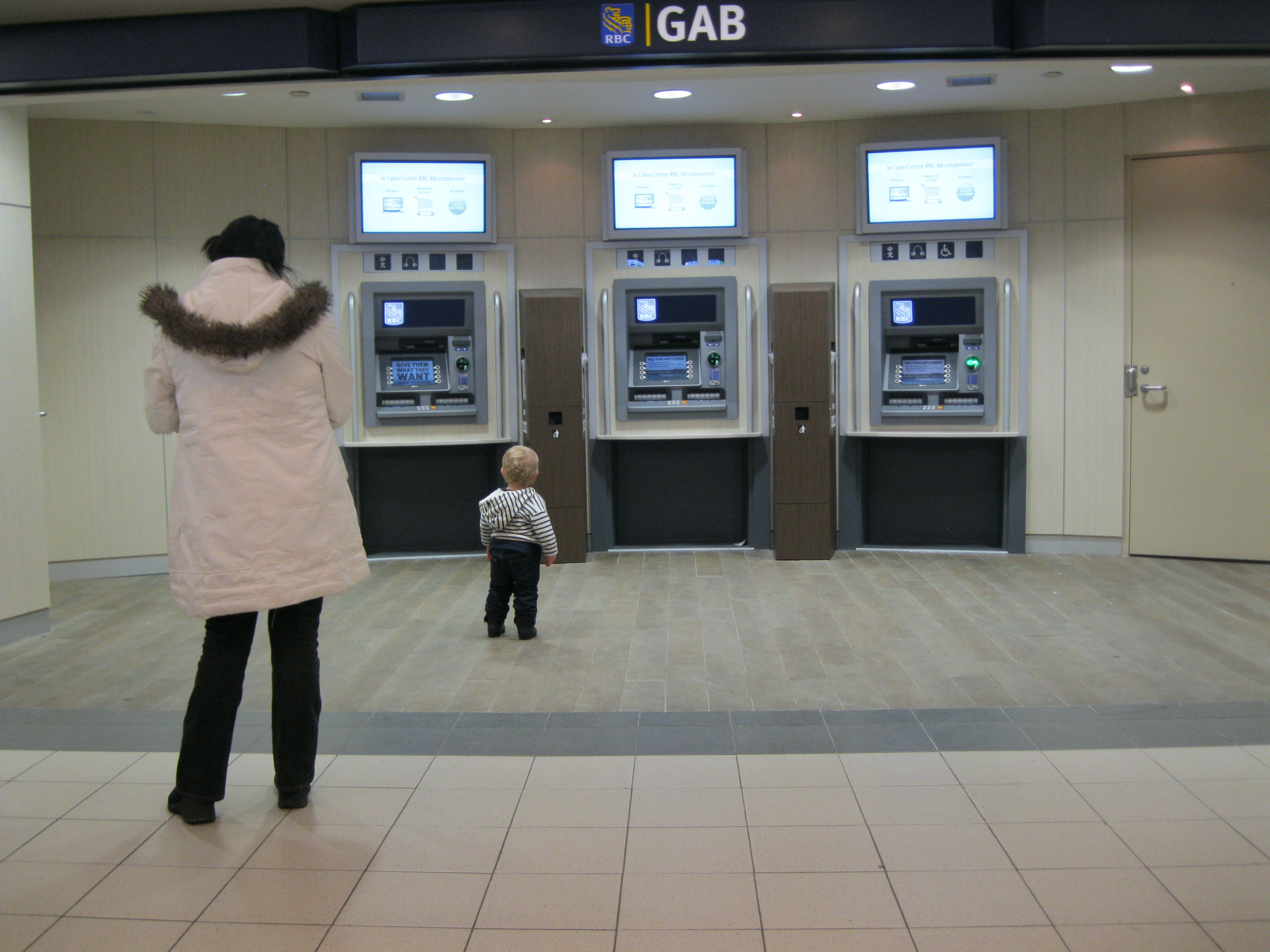 Un groupe de trois guichets automatiques bancaires de la Banque royale du Canada à la Place Bonaventure à Montréal